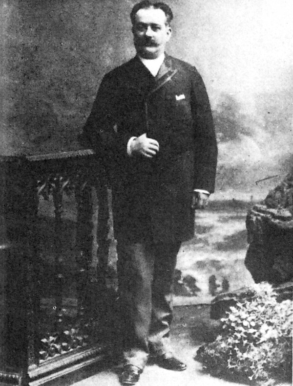 Ricardo Bentín (1853-1921) político, militar y empresario peruano. Presidente del Congreso de la República del Perú y Vicepresidente de la República.